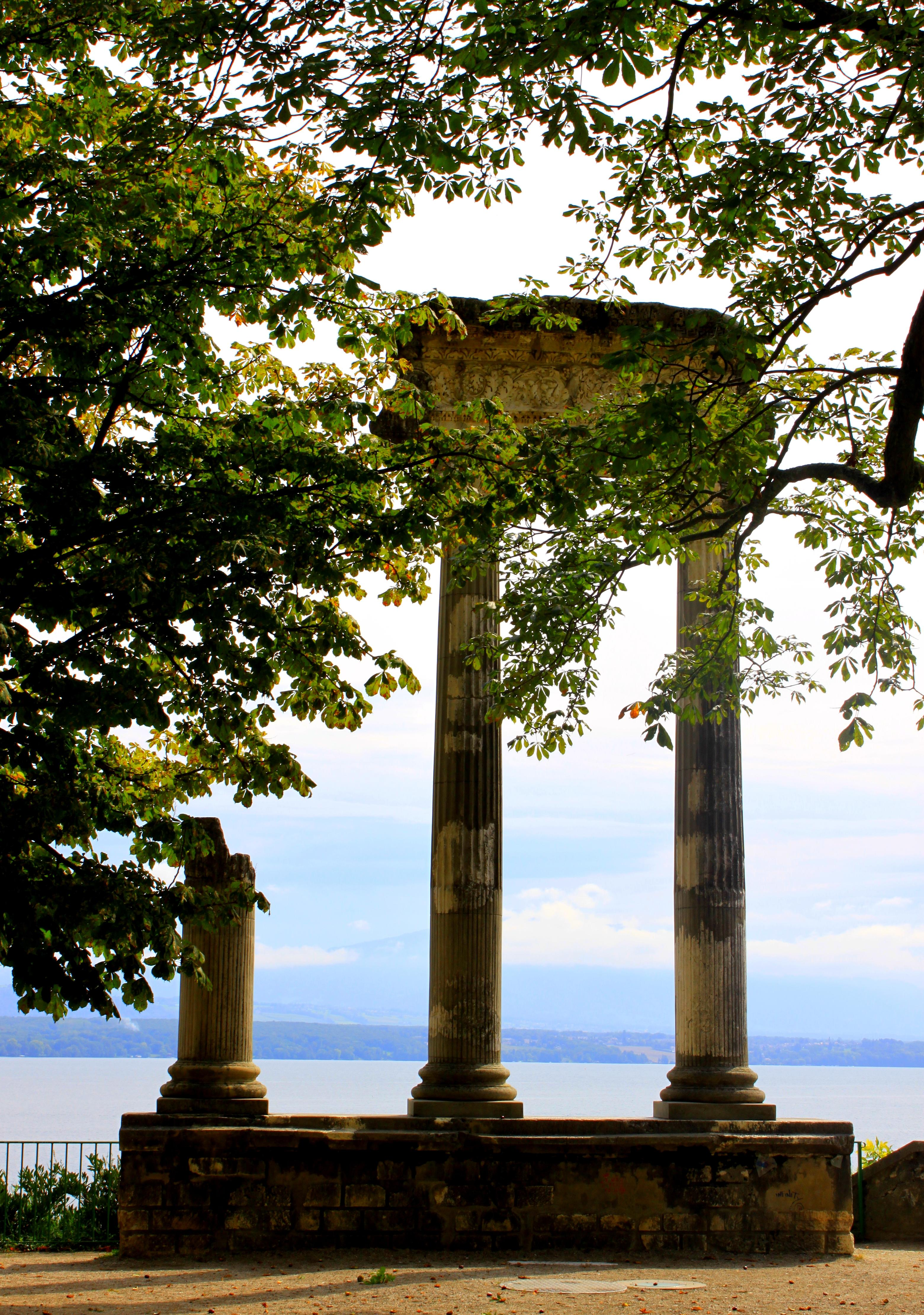 Suisse, canton de Vaud, Nyon, Colonia Iulia Equestris (ville romaine).